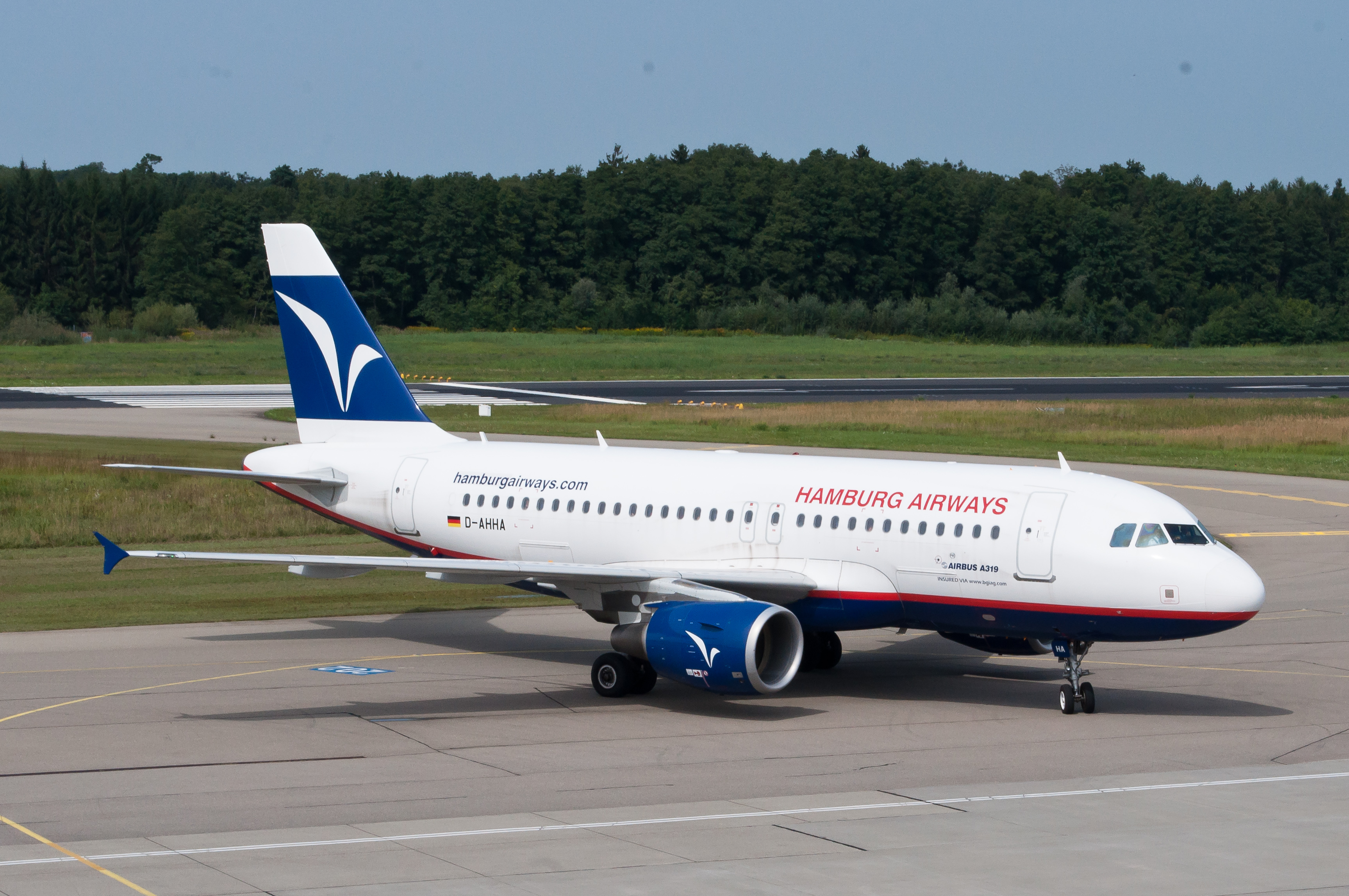 Hamburg Airlines A319 at Friedrichshafen